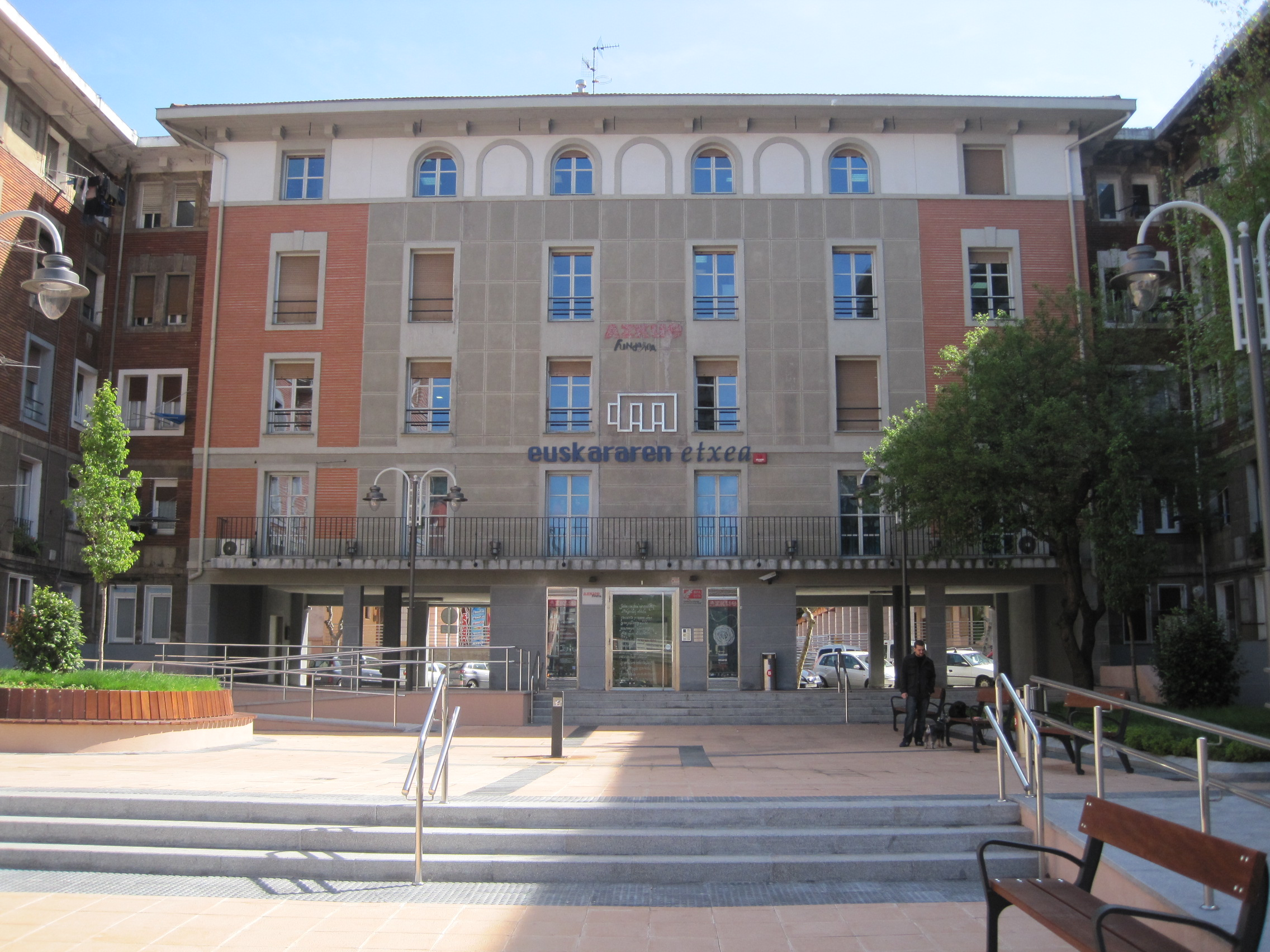 Euskararen Etxea Bilboko San Inazio auzoan dago, Lehendakari Agirre kalearen ondoan dagoen Agoitz Plazan.